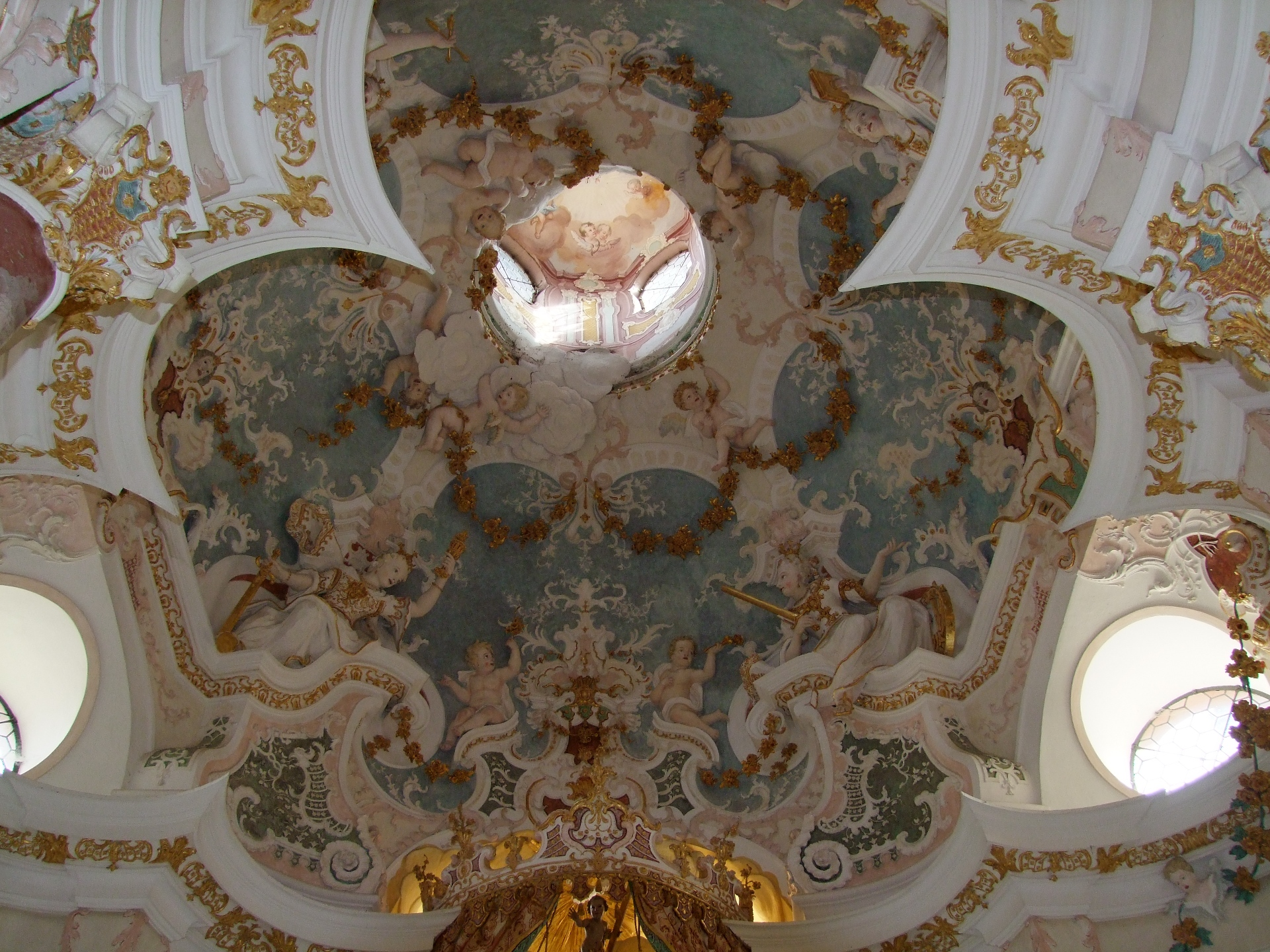 Die St. Annakapelle von Dominikus Zimmermann in der Kartause zu Buxheim